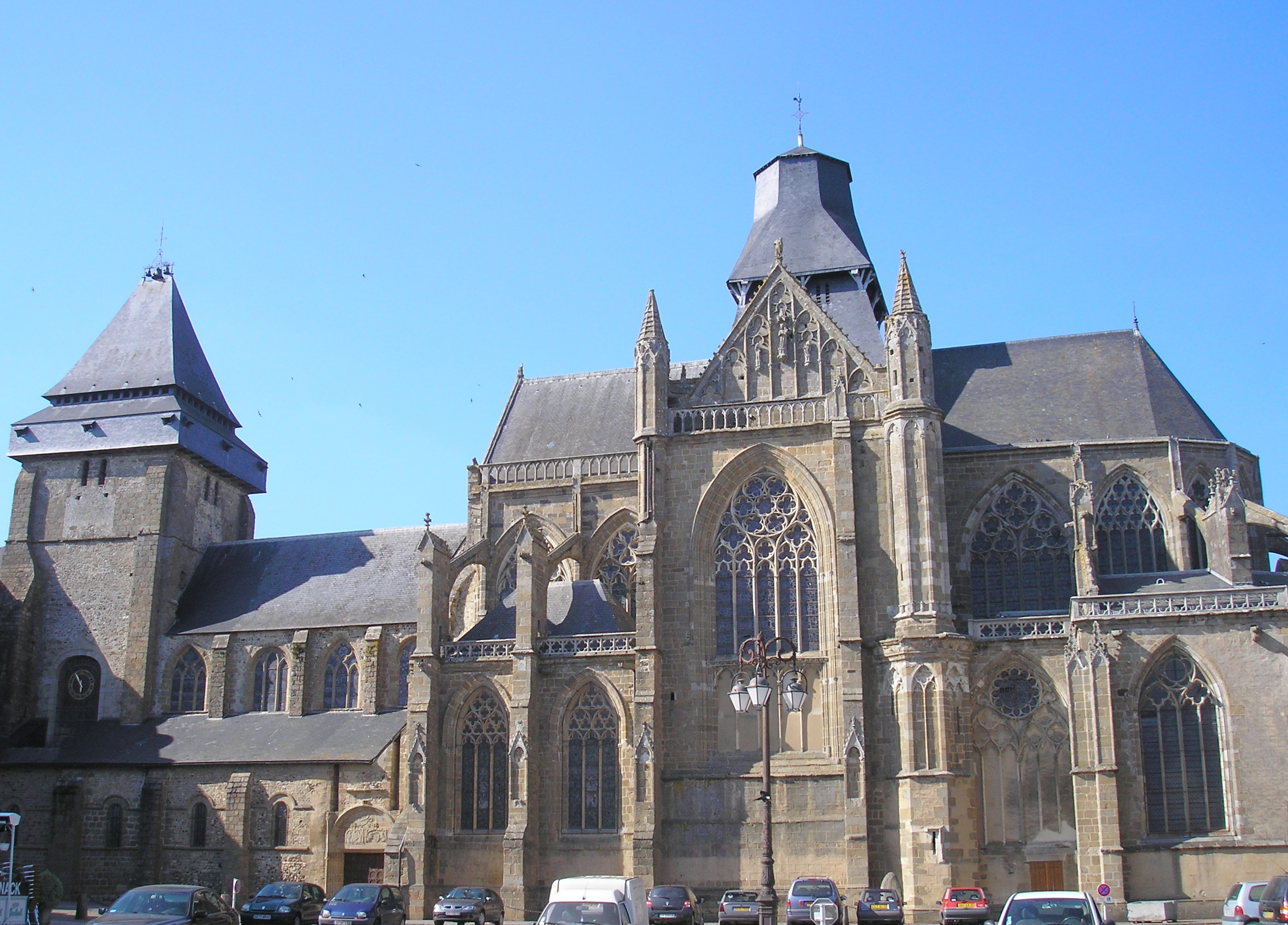 Évron (Pays de la Loire, France). L'abbaye Notre-Dame.